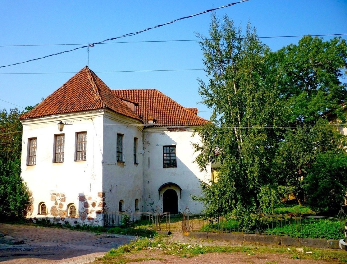 Вид снаружи